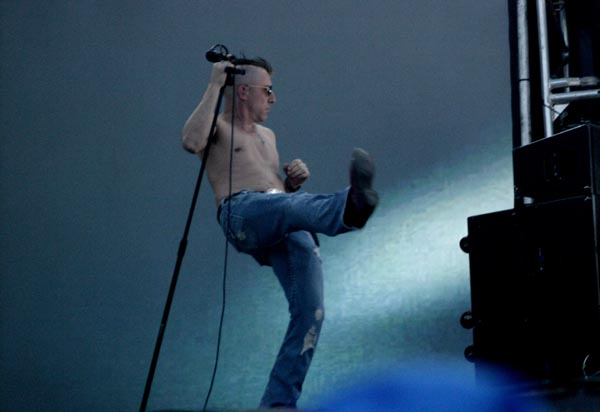 Maynard James Keenan fra TOOL på Ruisrock, Turku, Finland juli 2006